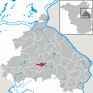 Buckow (Märkische Schweiz) in Brandenburg (Country) - District Märkisch-Oderland